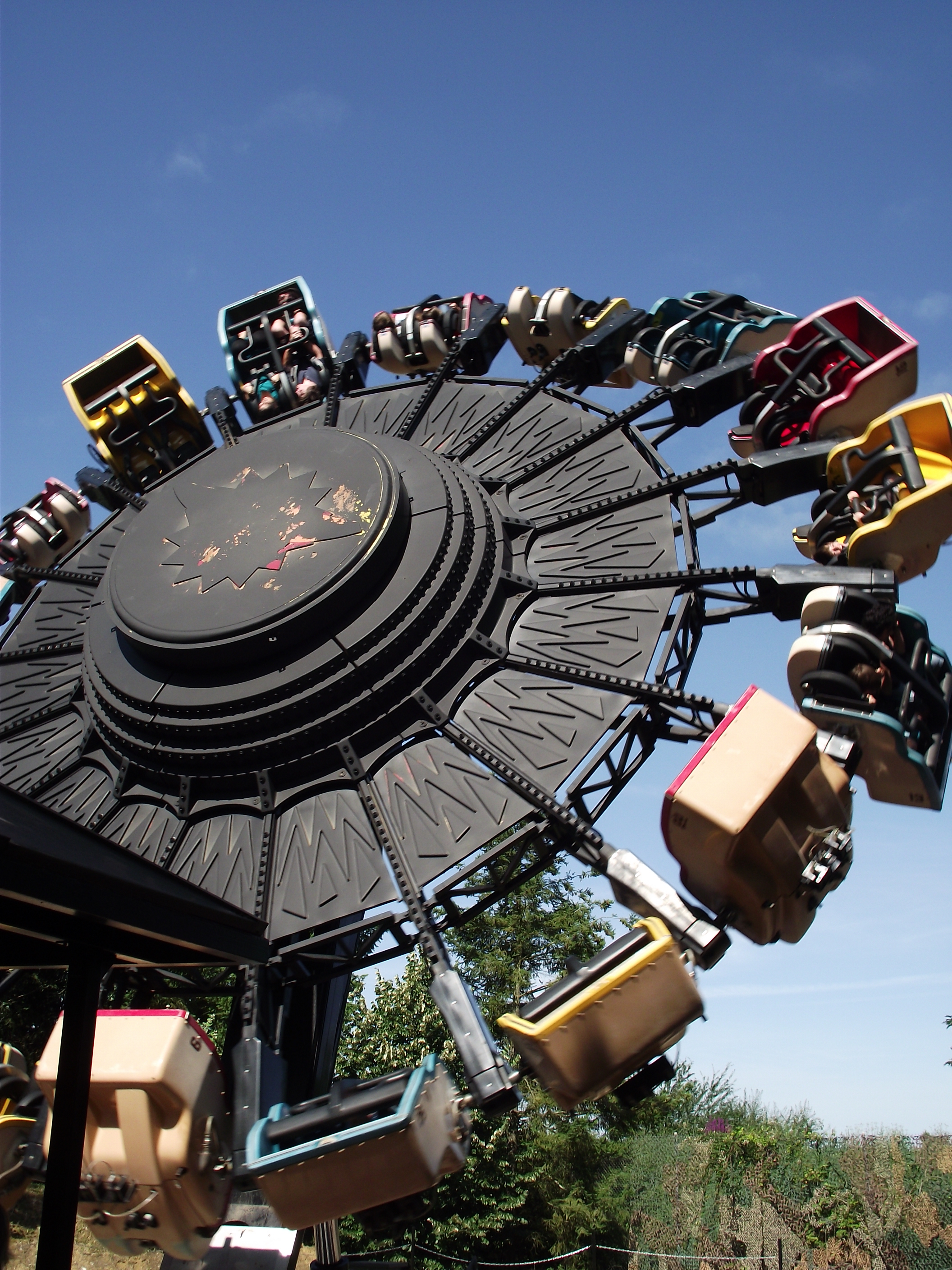 Psykédélik Walibi Sud-Ouest